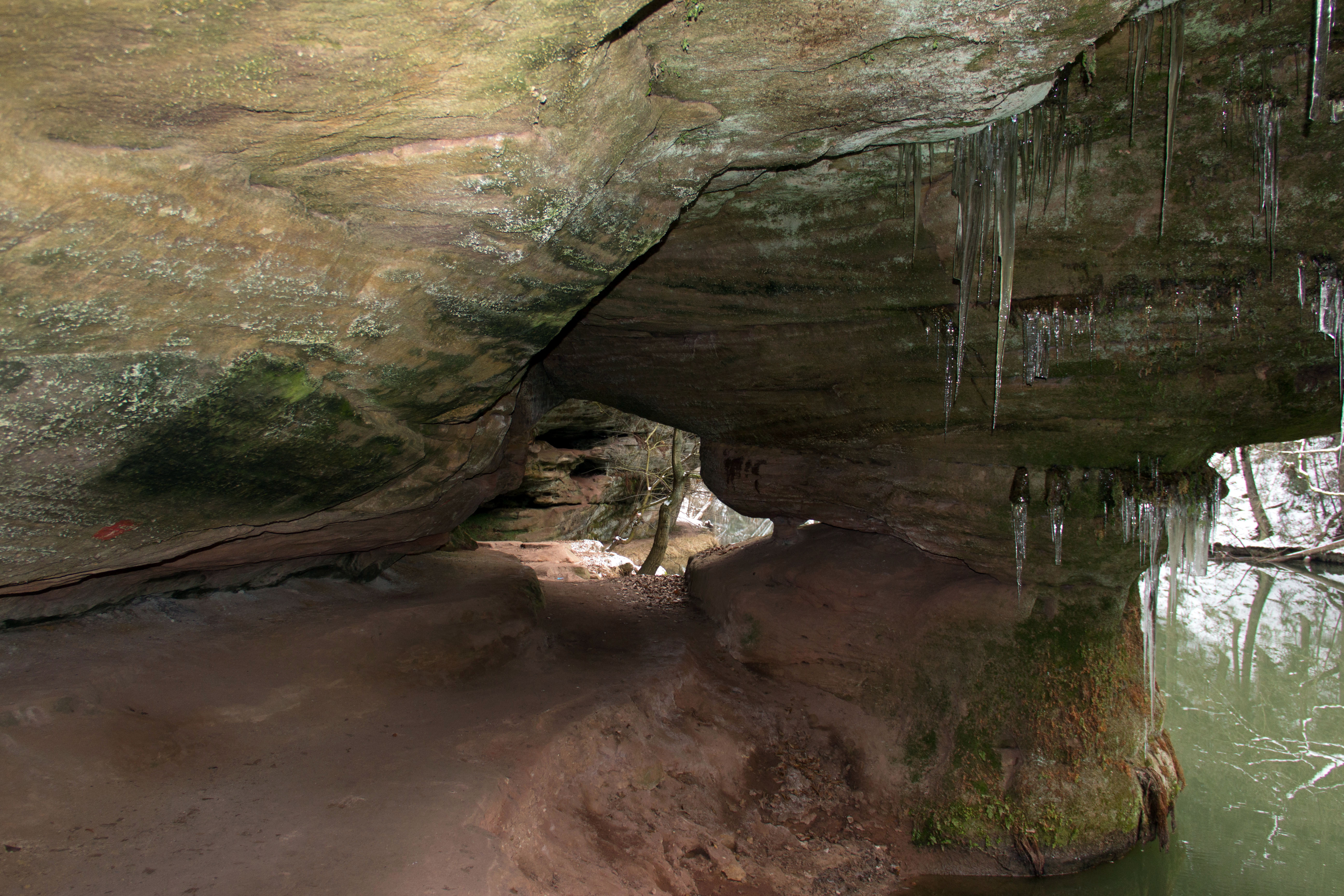 Schwarzachtalklamm bei Schwarzenbruck im Winter 2010